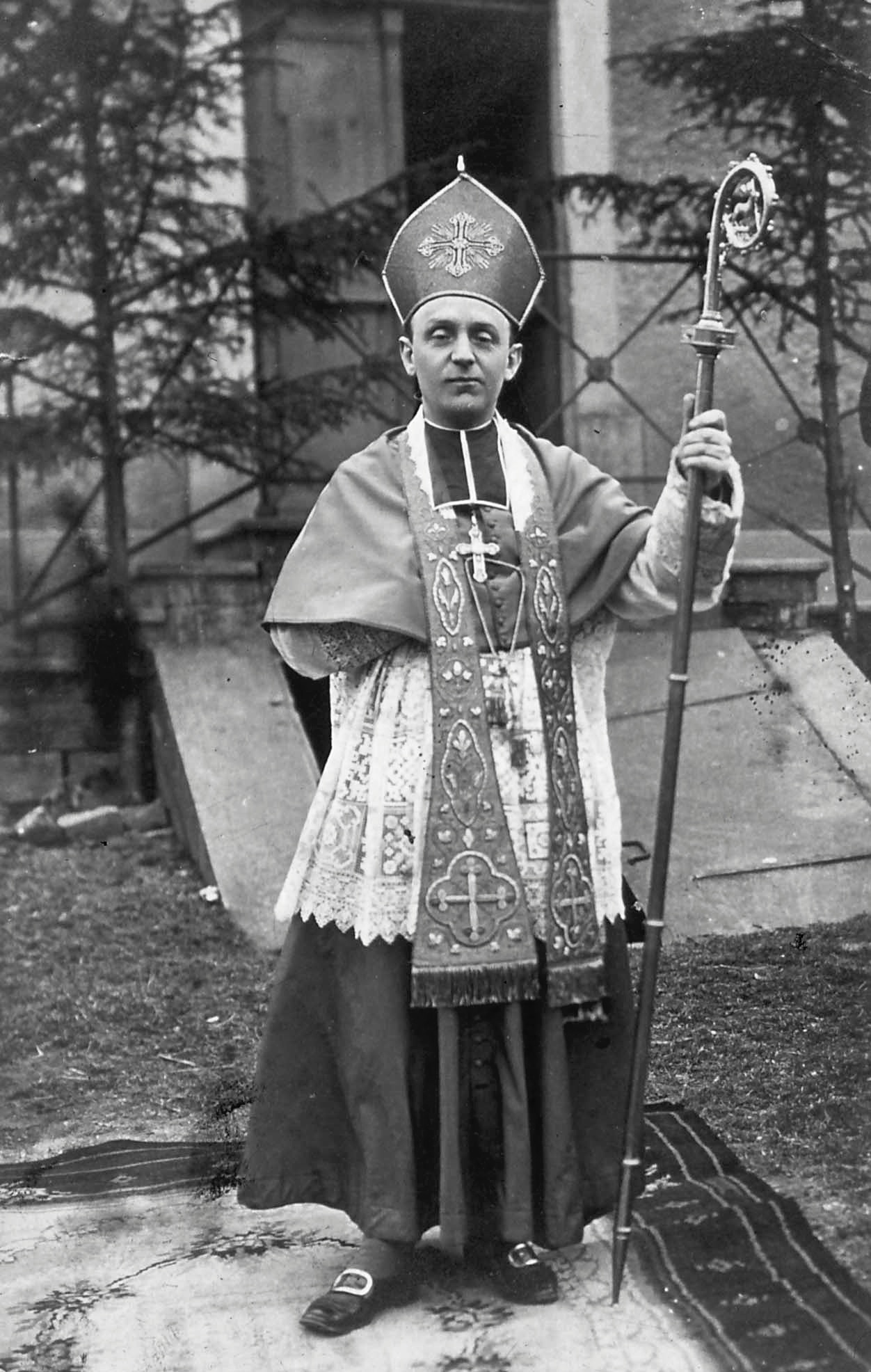 Mgr Charles Ruch, évêque de Strasbourg, 1913.